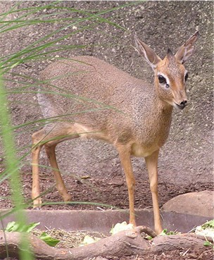 Kirks dikdik eigen foto